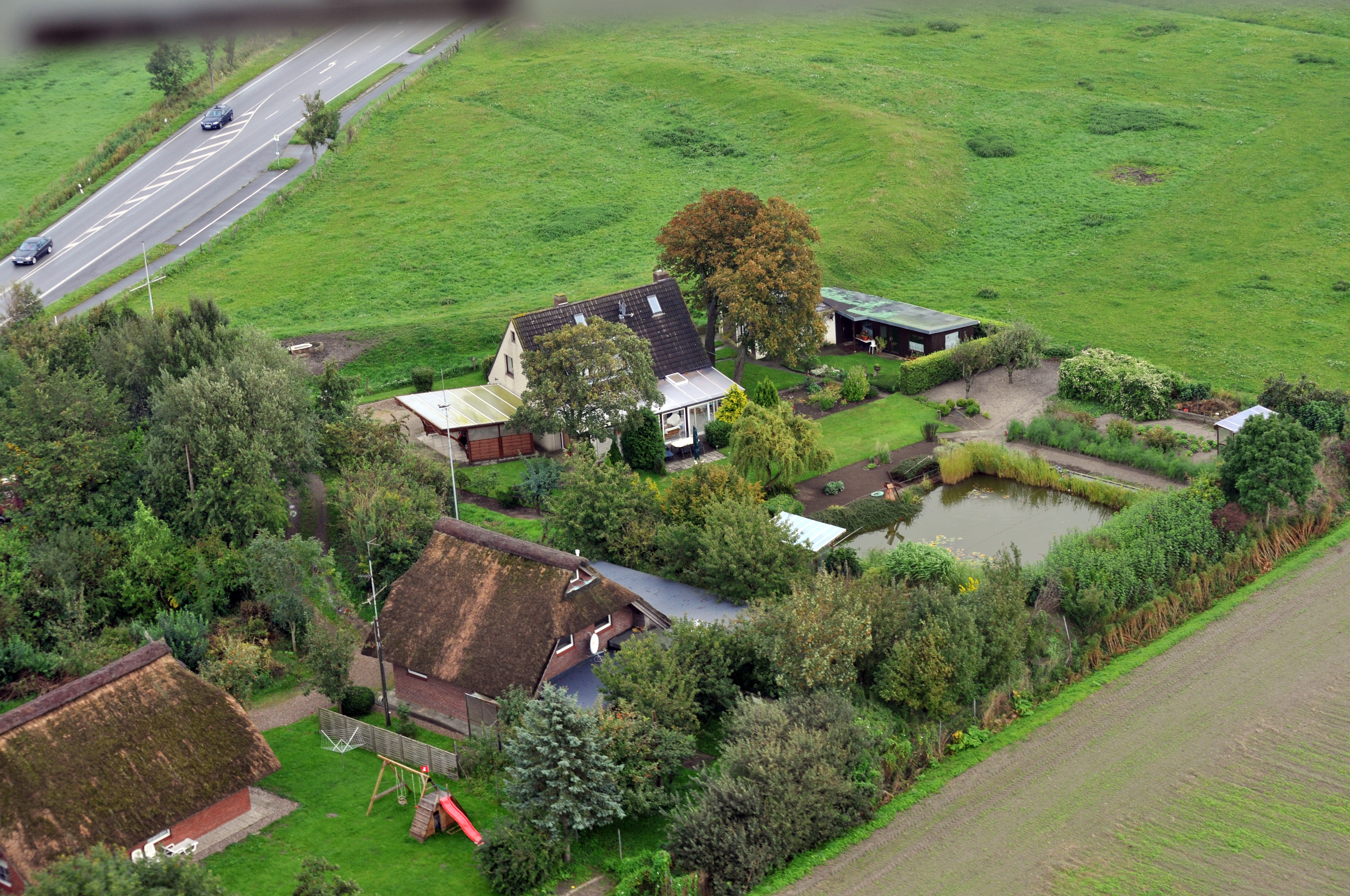 Fotoflug 4. Sept. 2011; Oesterdeichstrich, Kreis Dithmarschen, Schleswig-Holstein, Deutschland Dieses Foto entstand aufgrund eines Projektes, das von Wikimedia Deutschland e. V. gefördert wurde. Im Rahmen des „Community-Projektbudgets“ sollen Luftbilder u.a. von Inseln, Halligen, Sanden und Küstenorten der deutschen Nordseeküste angefertigt werden. Das Projekt „Fotoflüge“ wurde im September 2011 begonnen.